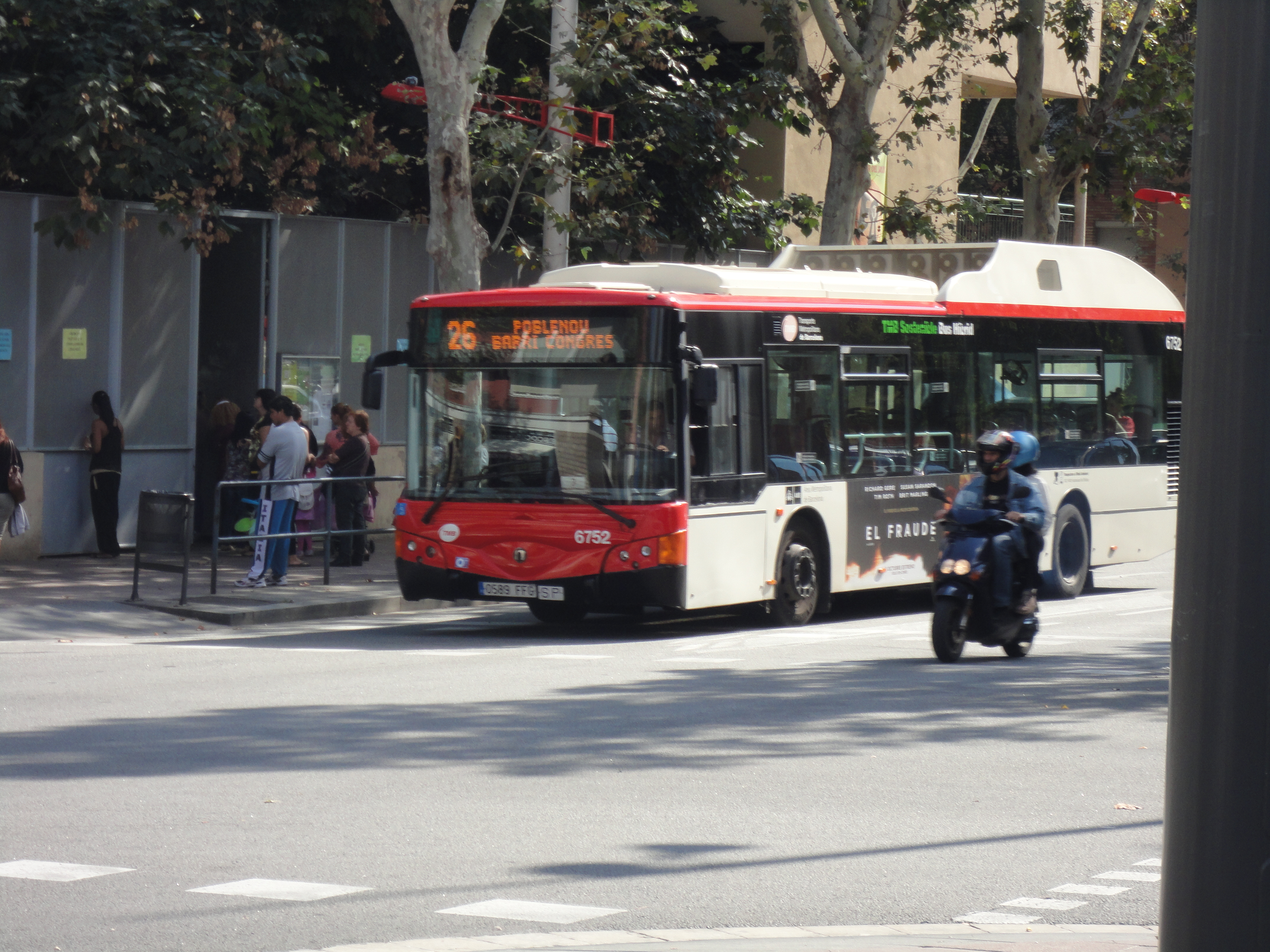 Autobús de Barcelona